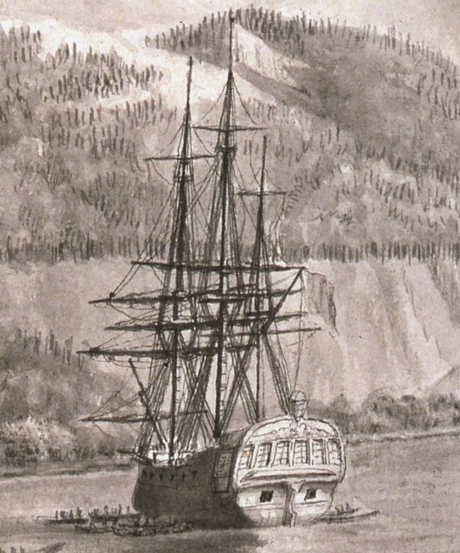 La Boussole au mouillage probablement en Alaska. Détail d'un dessin réalisé pour l'Atlas du voyage de La Pérouse publié en 1797. Navire commandé par La Pérouse.